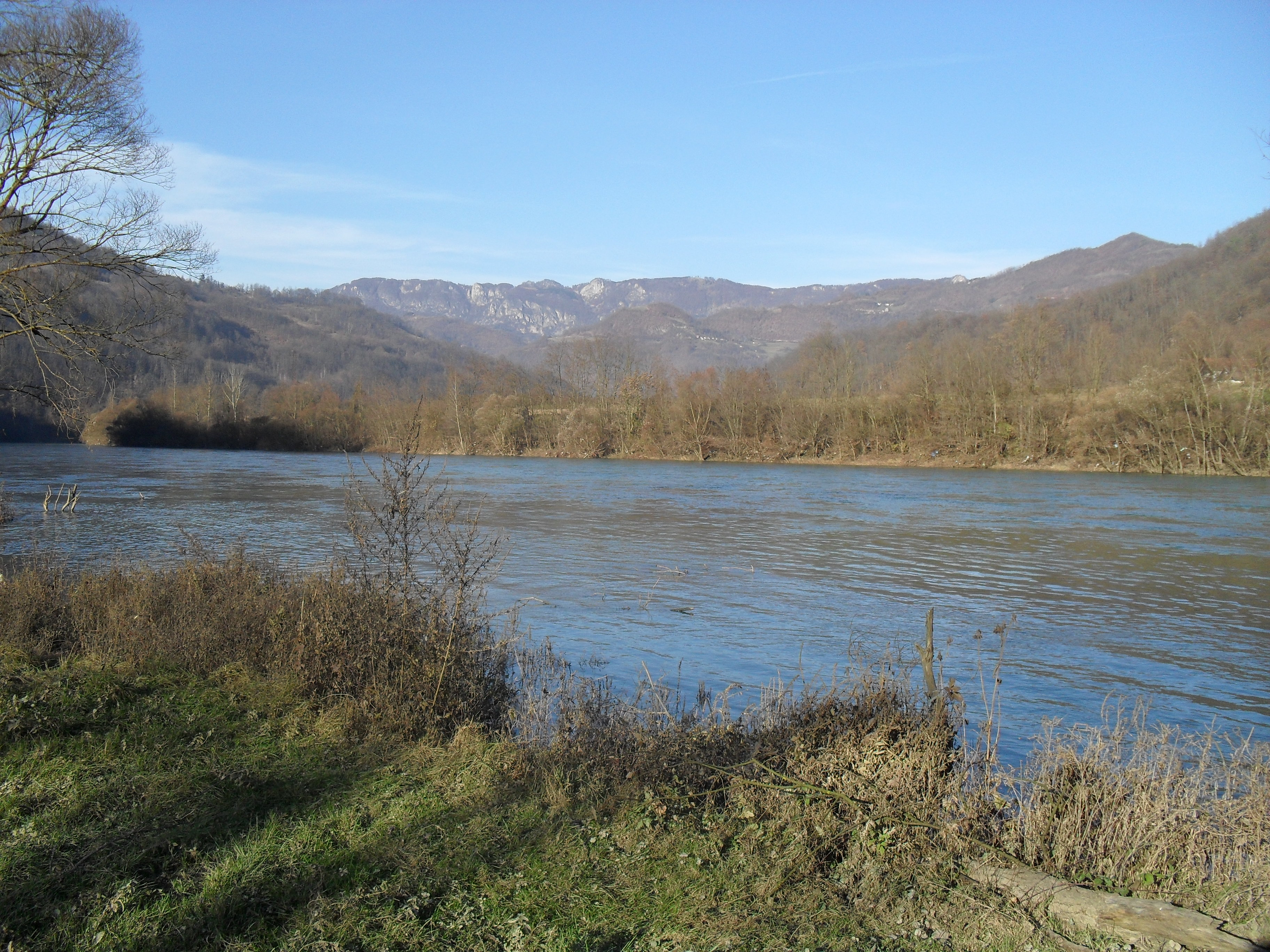 Река Дрина у близини села Петрича. Из приватног албума